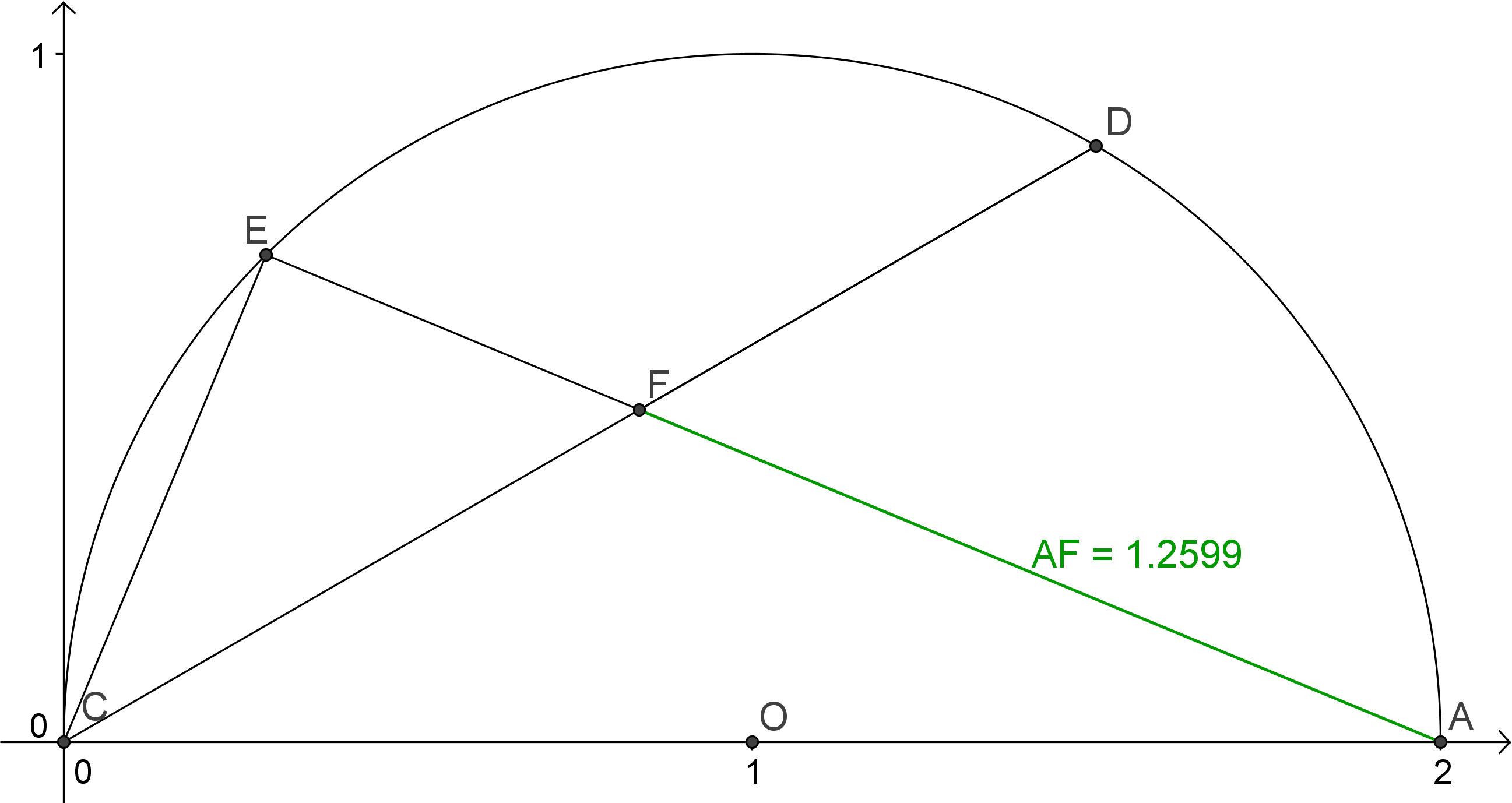 Duplicació del cub